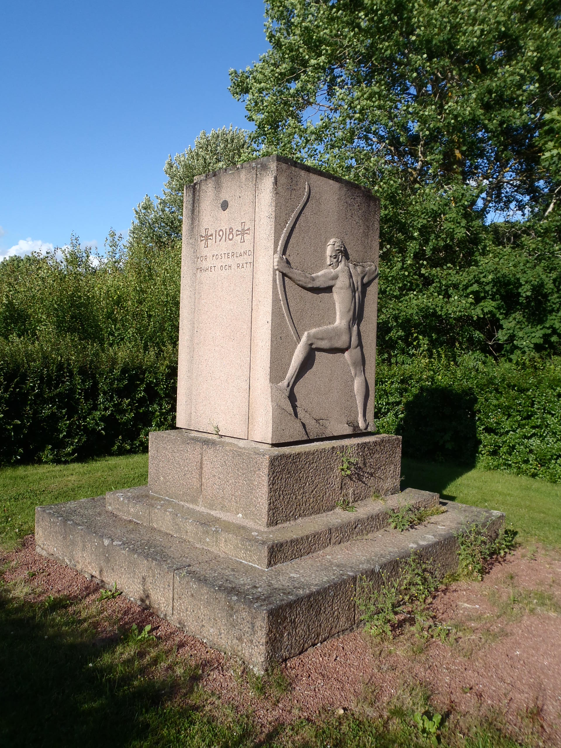 Godby, minnessten över stupade på den vita sidan under inbördeskriget 1918.